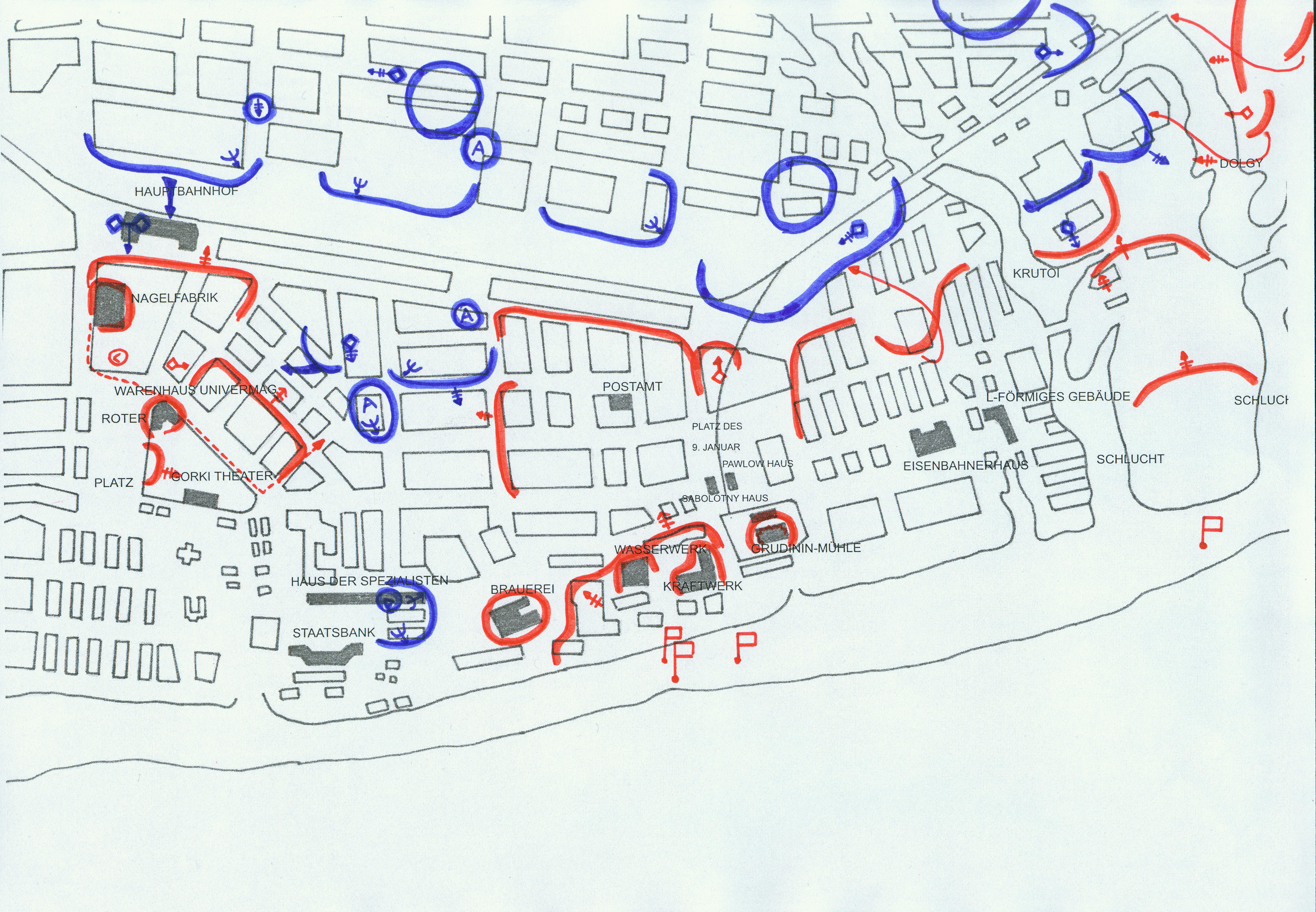 Stalingrad-Mitte 21.09.1942